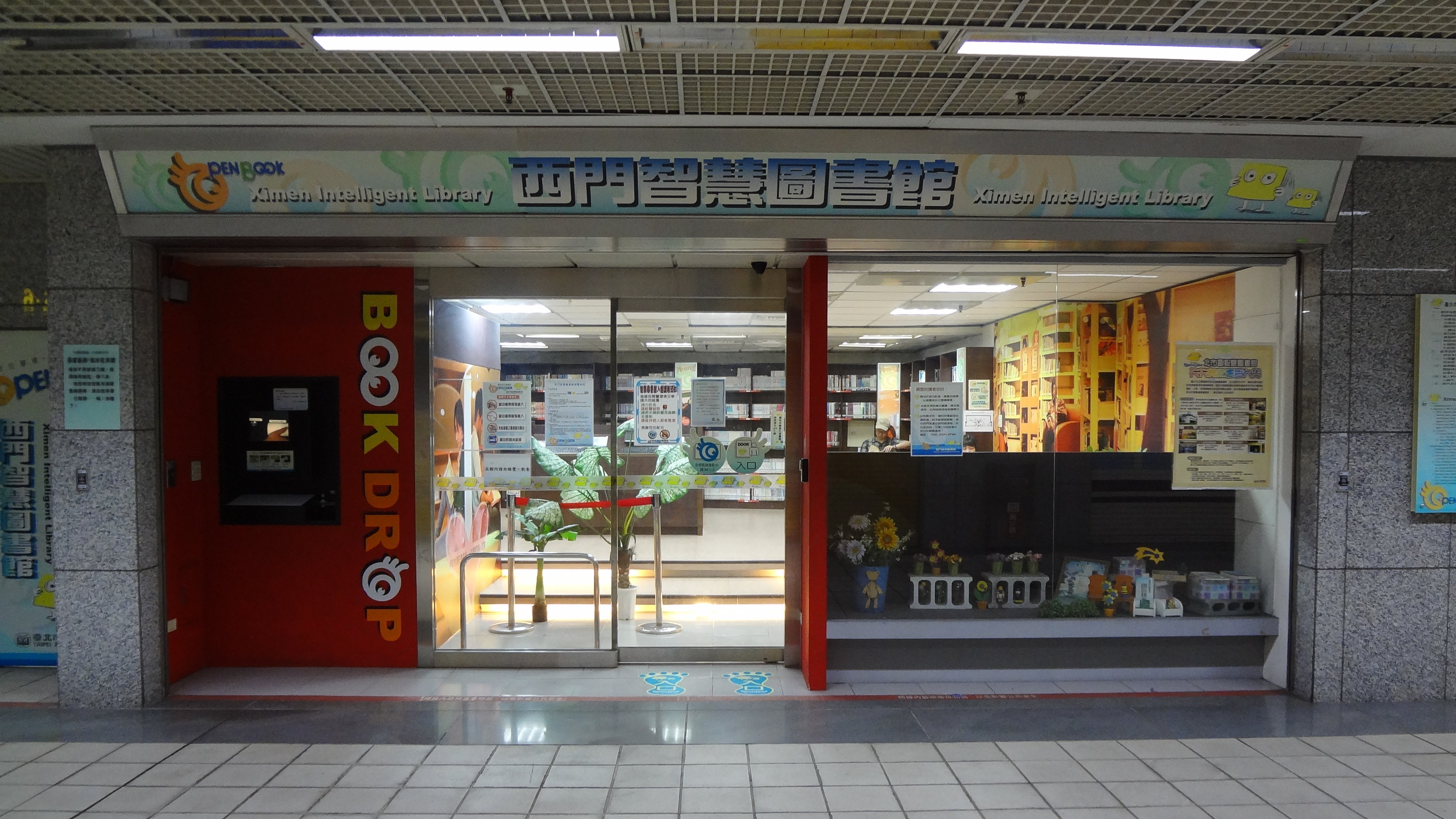 臺北市立圖書館西門智慧圖書館入口。